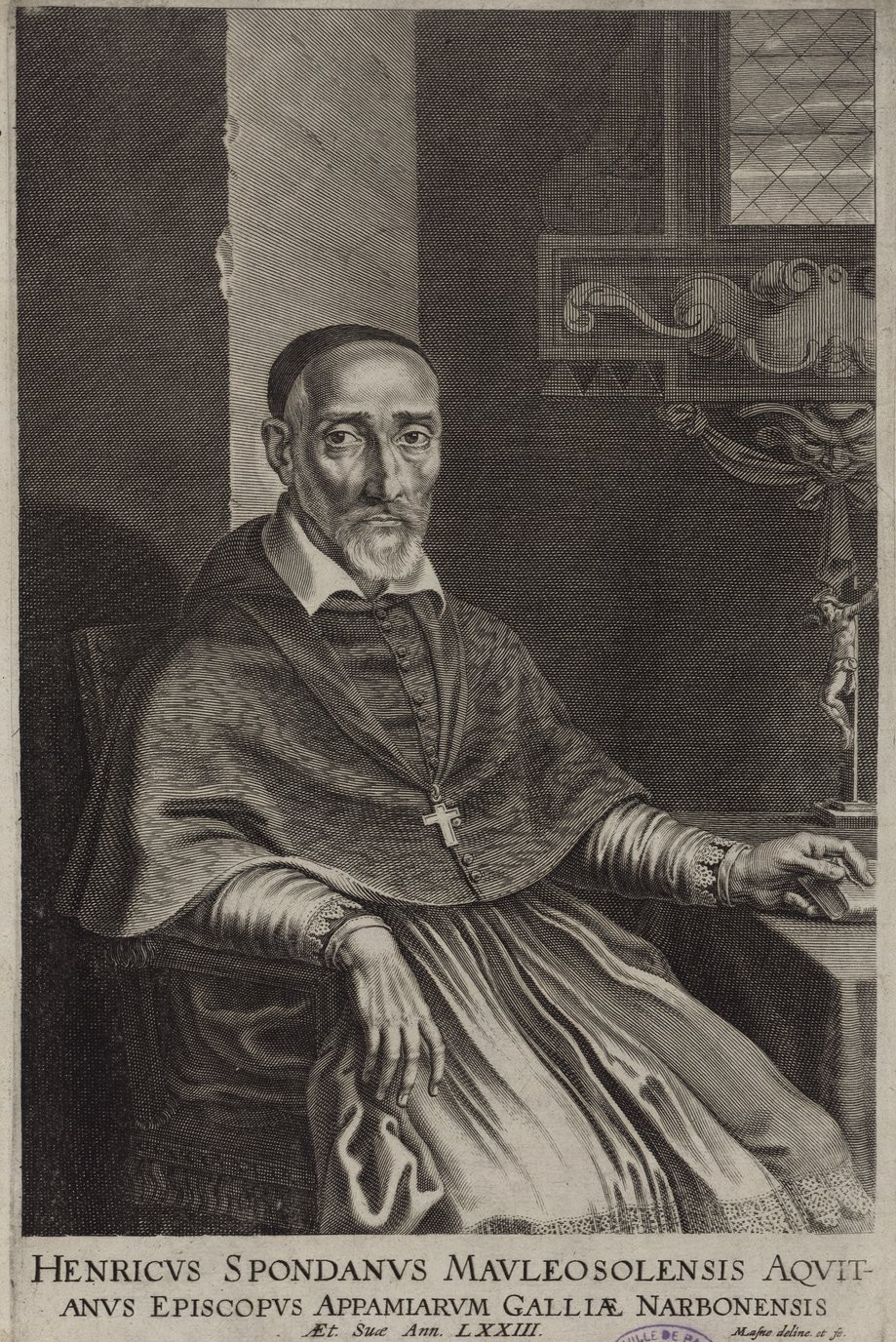 l'évêque de Pamiers, Henri de Sponde, ravure par Michel Lasne (1641).